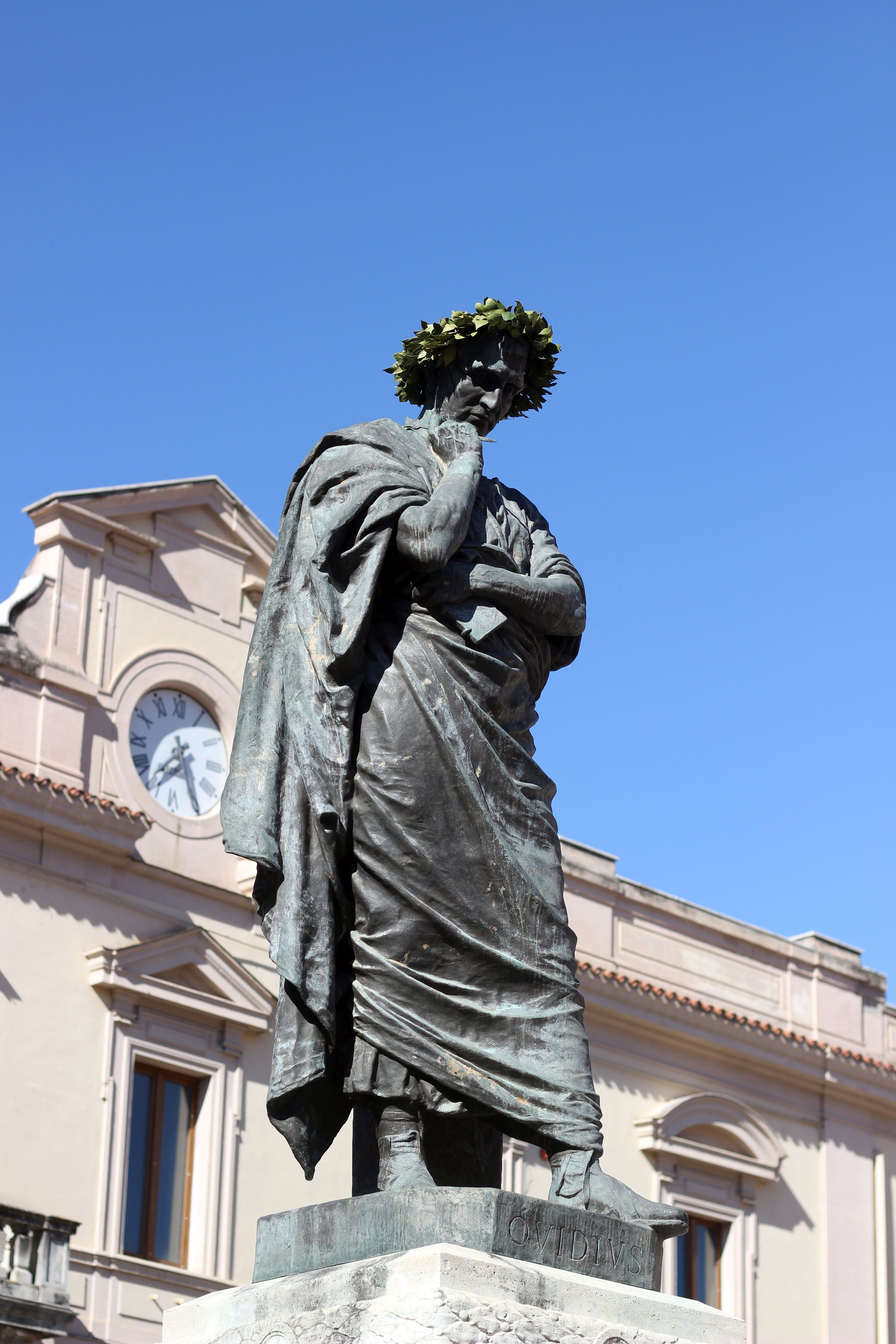 Ovidstatue in Sulmona 2018